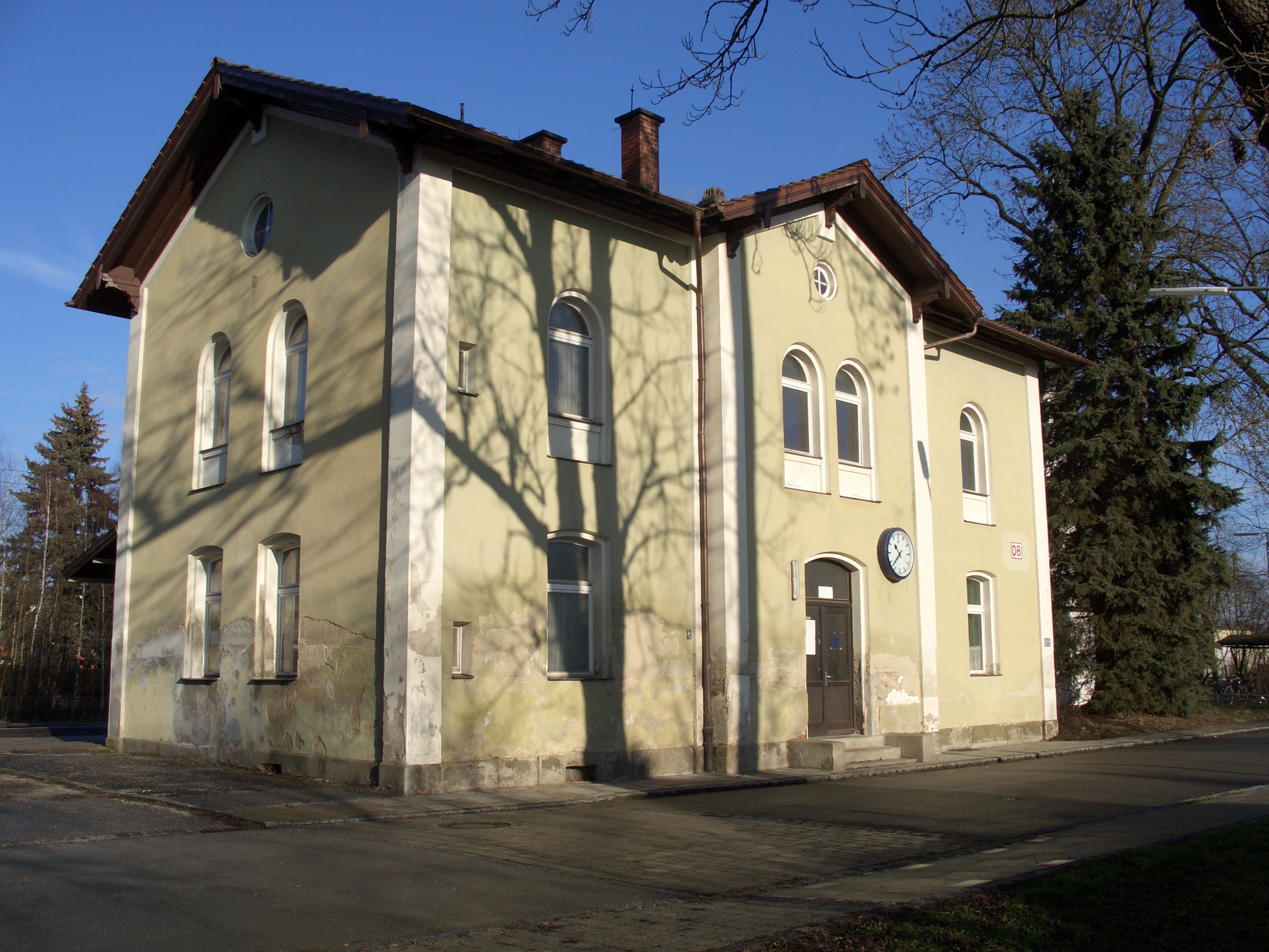 Bahnhof Wallersdorf von Süden. Bayern, Deutschland.